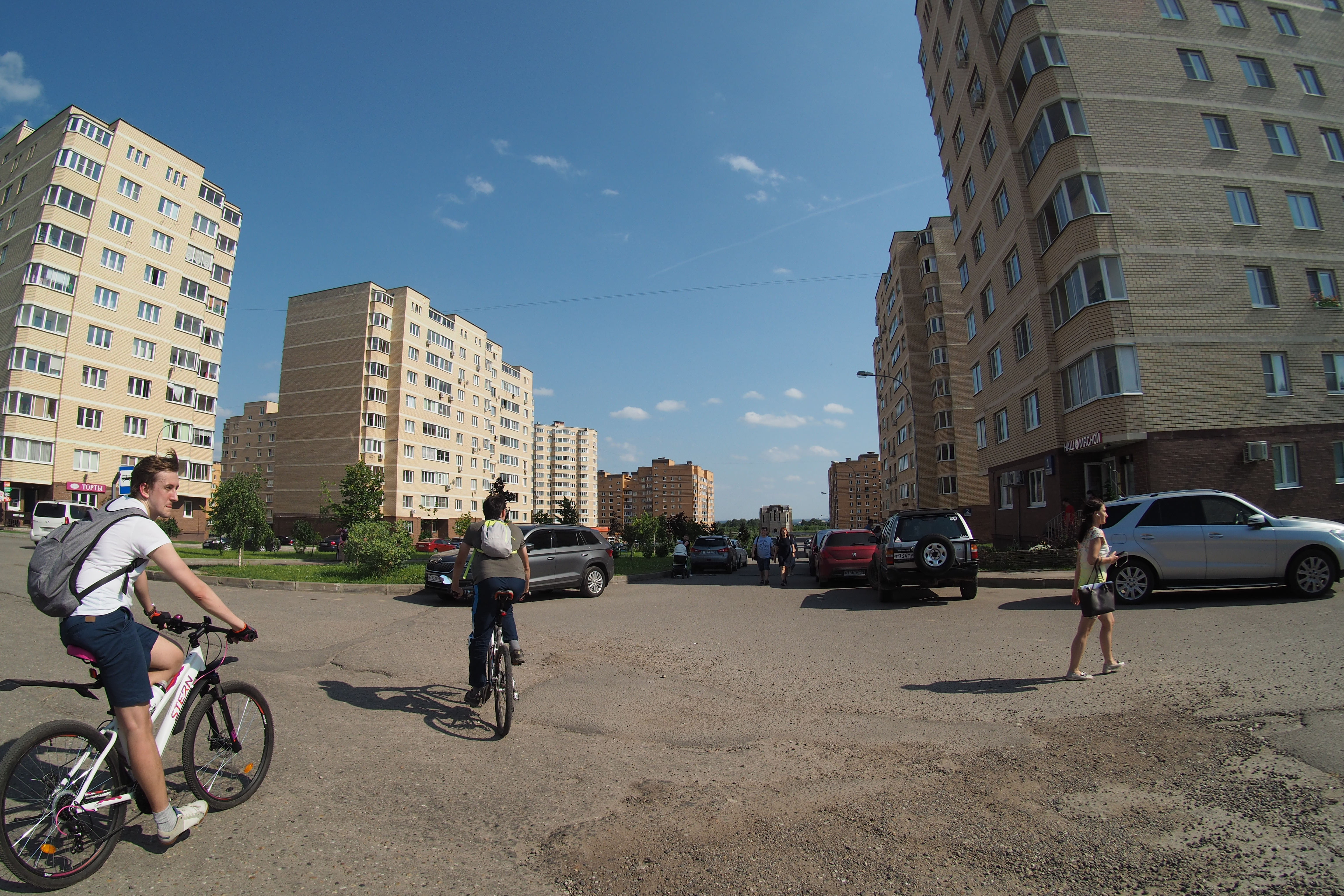 комплекс Новоснегирёвский